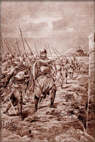 Hugo Schüllinger - Dobytí Prahy Jiříkem z Poděbrad r. 1448